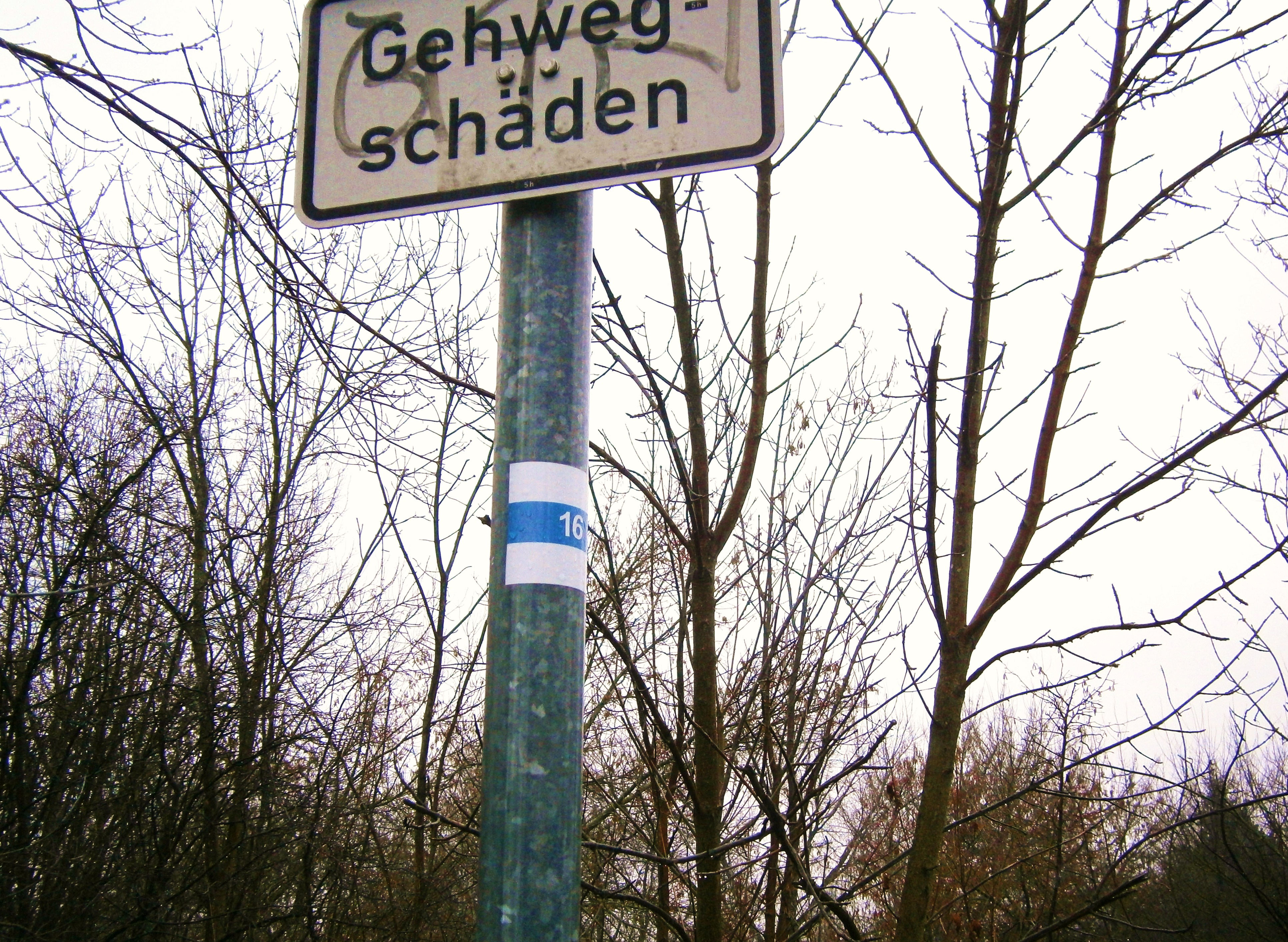 Die Friedenswegbrücke ist eine Brücke über den Nordgraben, sie liegt am Tripelpunkt der Ortsteile Blankenfelde, Rosenthal und Französisch Buchholz im Berliner Bezirk Pankow. Die Markierung der Humboldt-Spur (Nr. 16) am Pfosten des Rosenthaler Brückenkopfs.